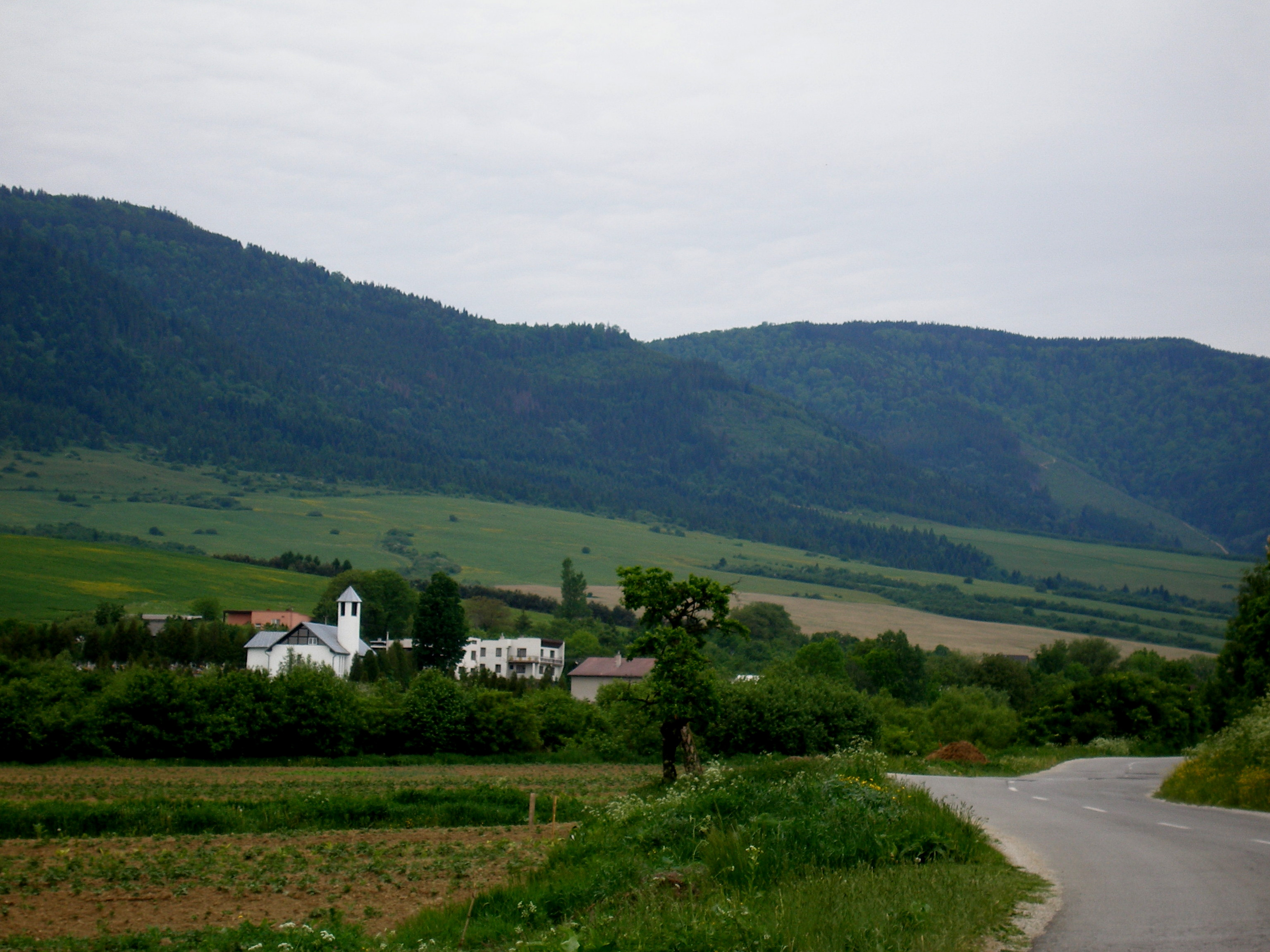 Obec Krásna Lúka okres Sabinov.